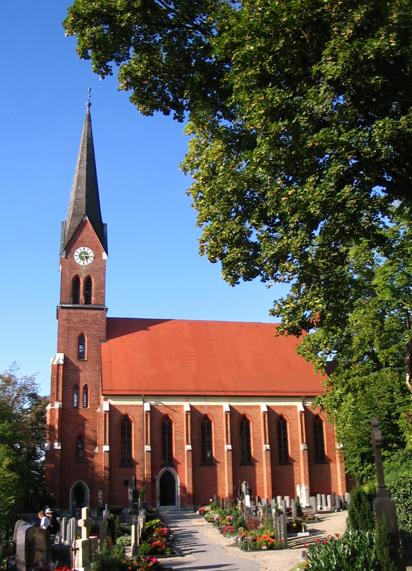 Pfarrkirche St.Nikolaus in Bad Abbach, Landkreis Kelheim, Niederbayern